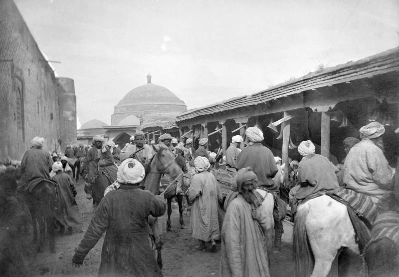 Из Стамбула в Ташкент: Фотопленки Поля Надара (1890). Часть 12. Самарканд